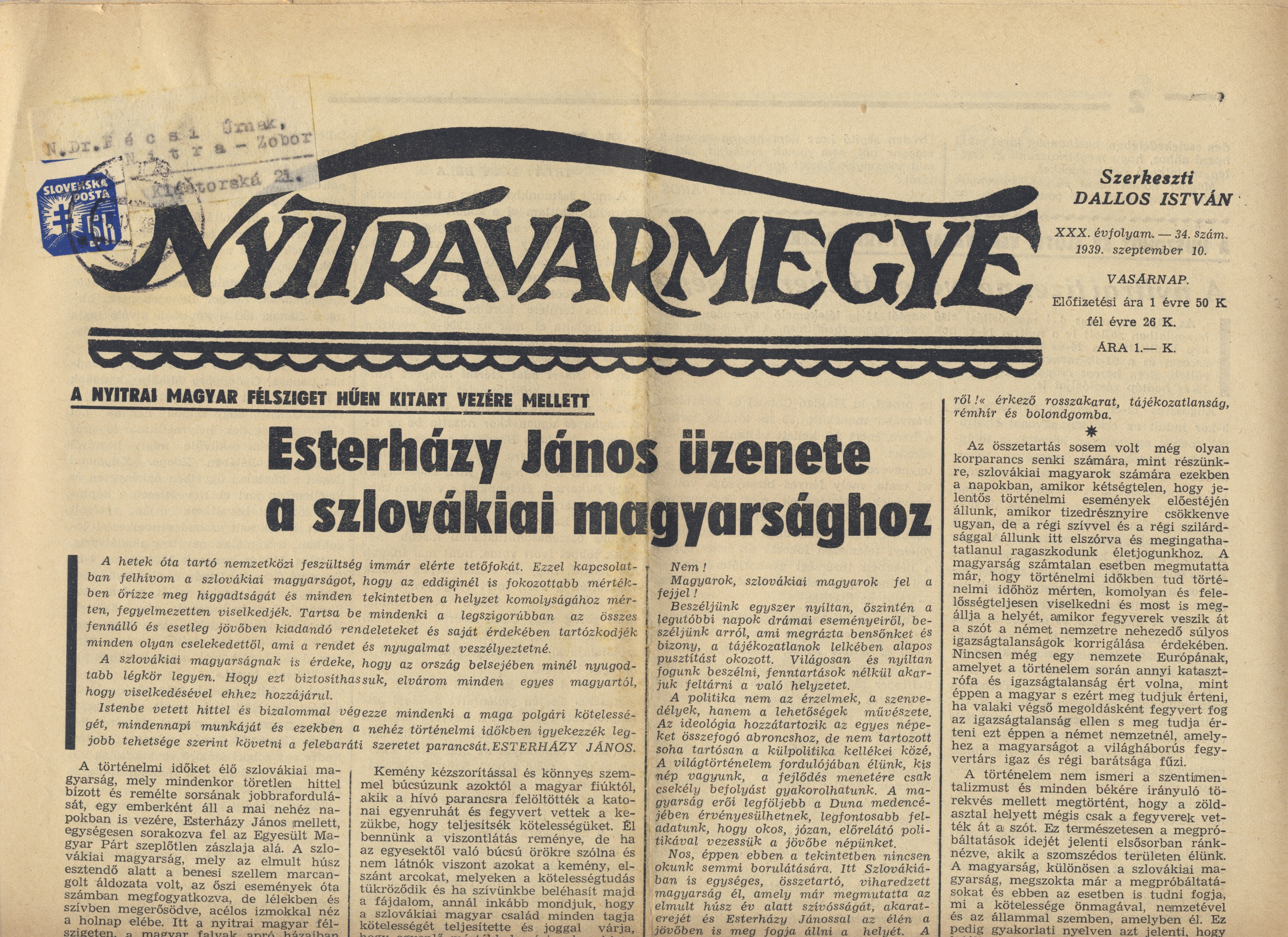 Nyitravármegye